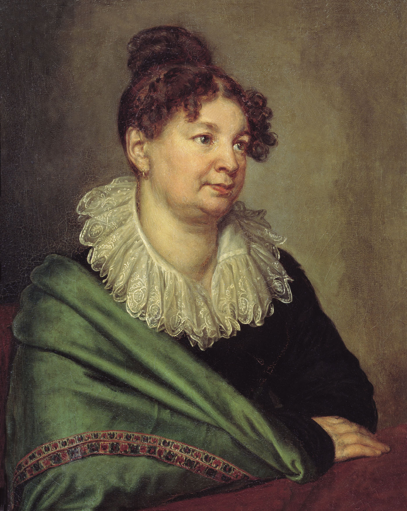 Екатерина Борисовна Ахвердова, дочь барона Бориса Ивановича Меллера, жена Н. И. Ахвердова.